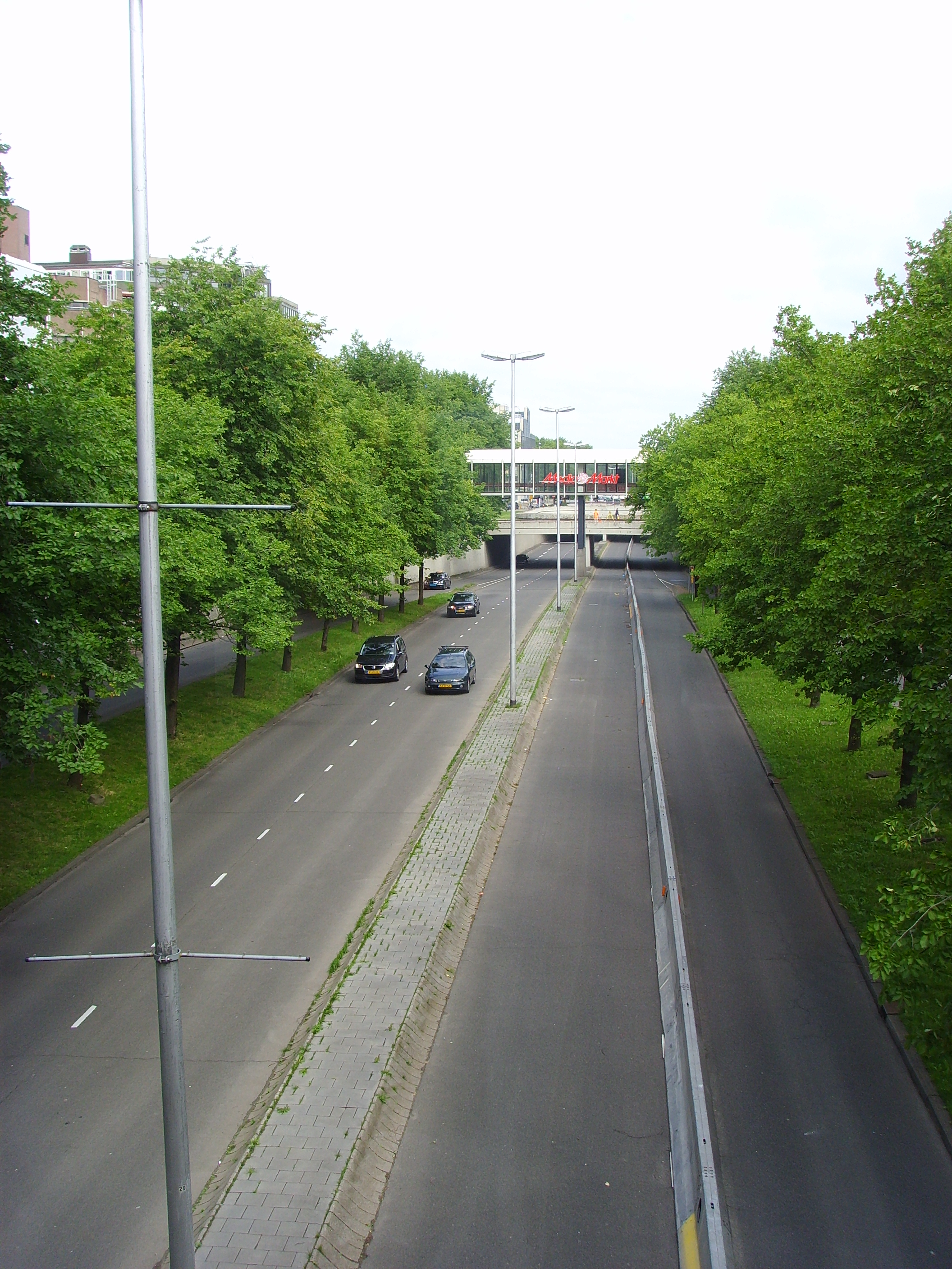 De Catharijnesingel, omgebouwd tot vierbaansweg, gefotografeerd vanuit winkelcentrum Hoog Catharijne in de binnenstad van Utrecht - Google Maps - Google Earth